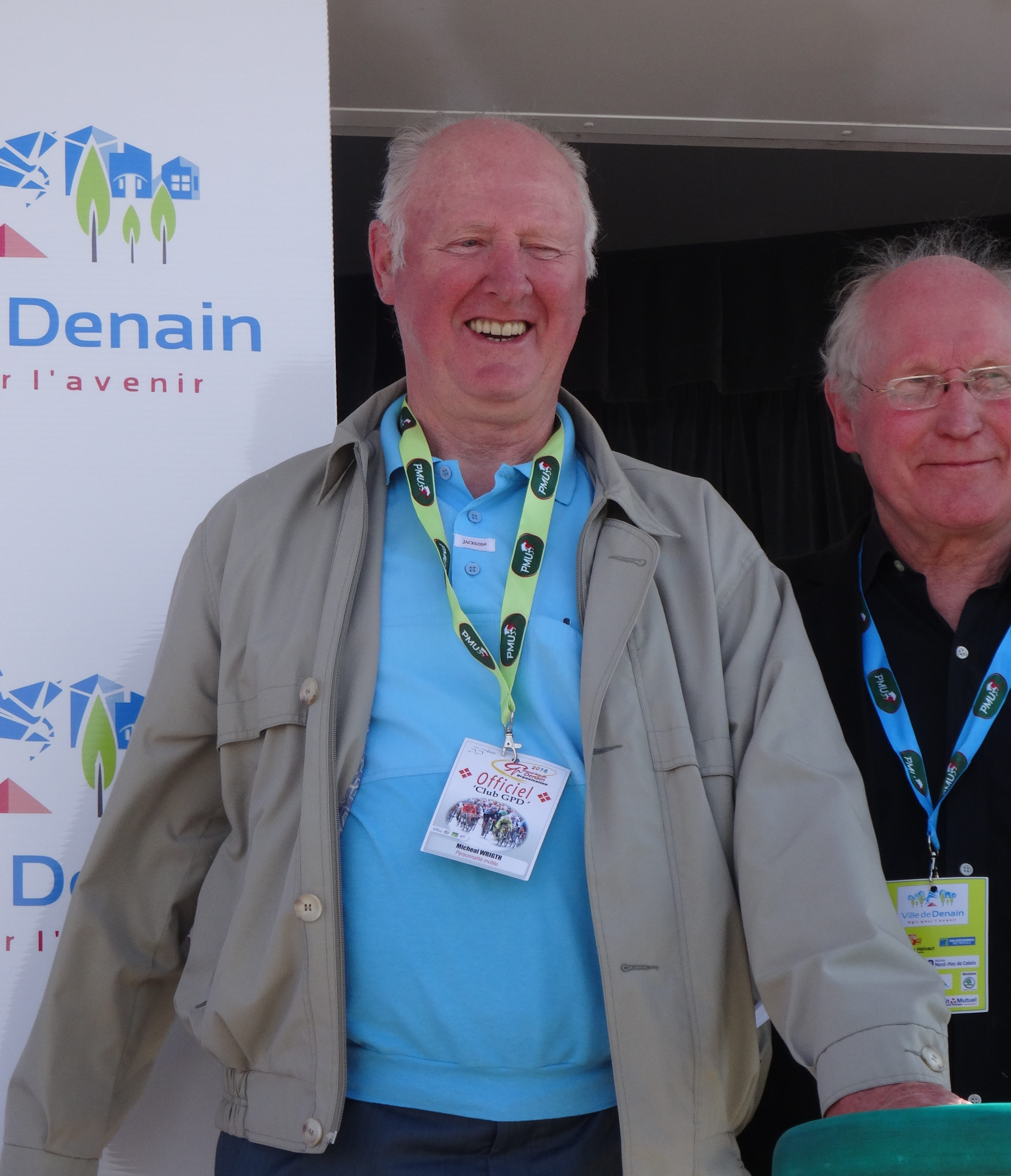 Reportage réalisé le jeudi 17 avril à l'occasion du départ et de l'arrivée du Grand Prix de Denain 2014 à Denain, Nord, Nord-Pas-de-Calais, France.